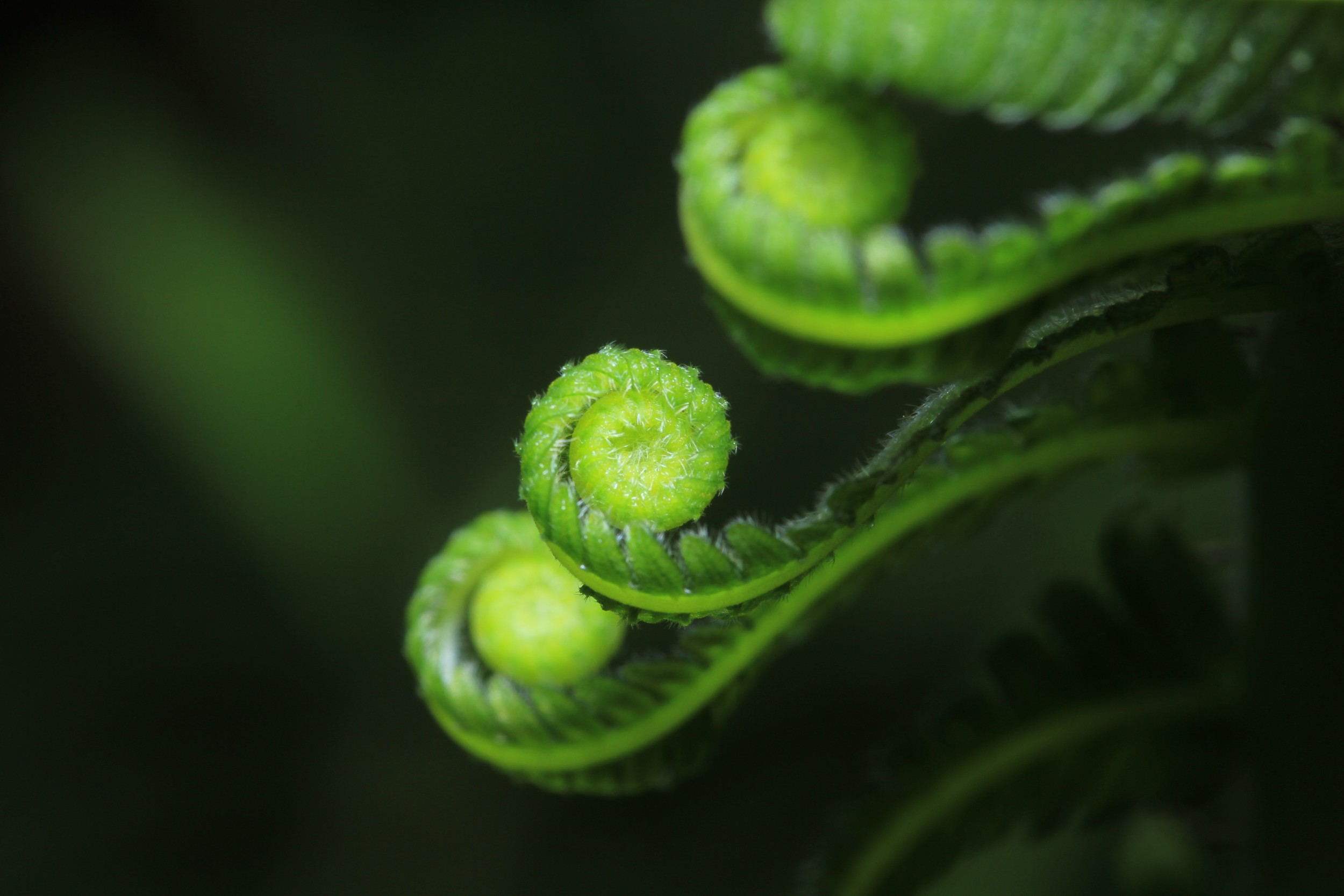 Folha jovem da samambaia